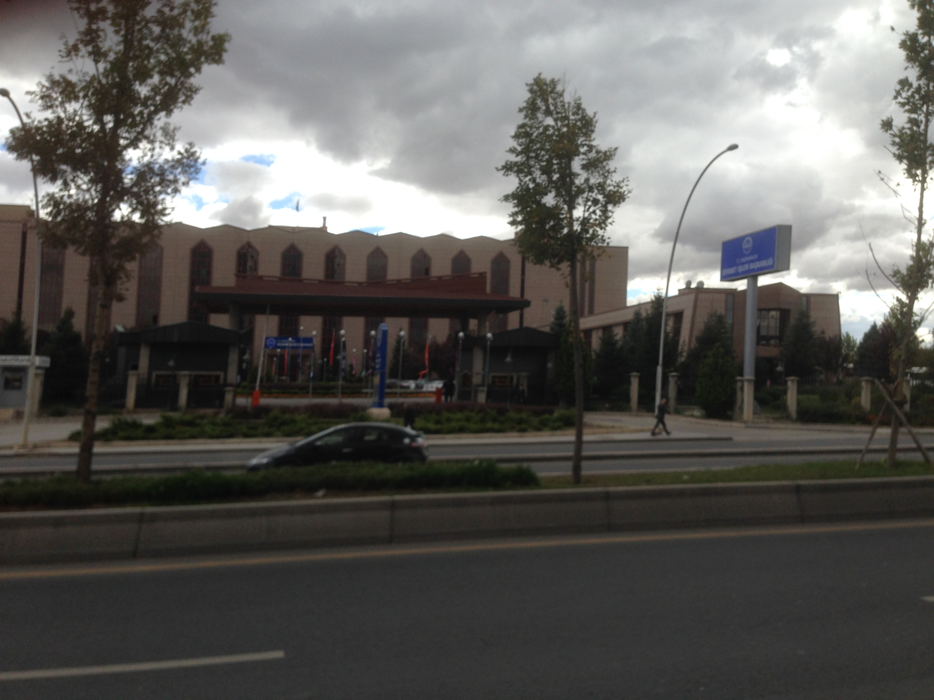 Türkiye Diyanet İşleri Başkanlığı Binası, Ankara